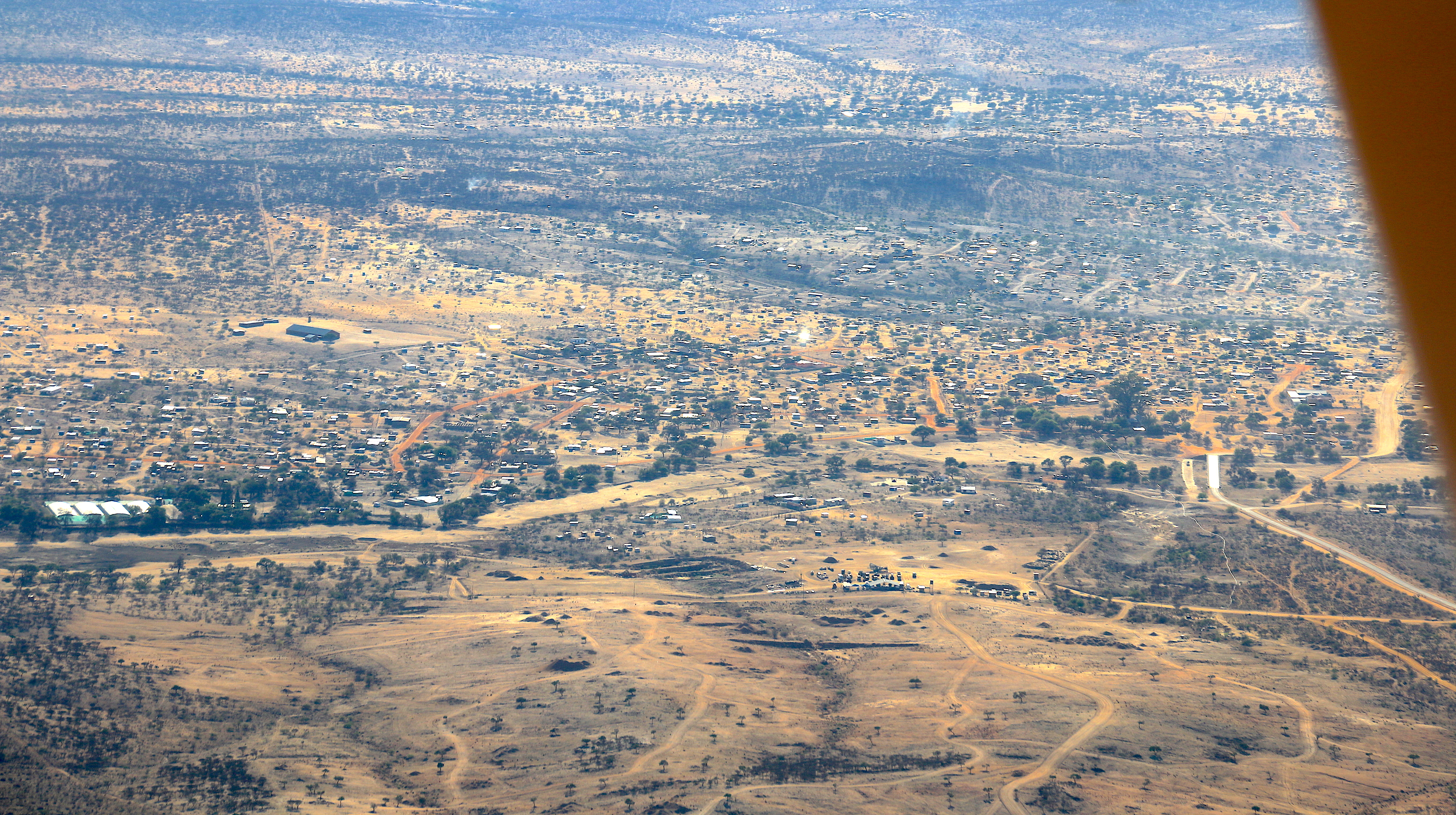 Groot Aub